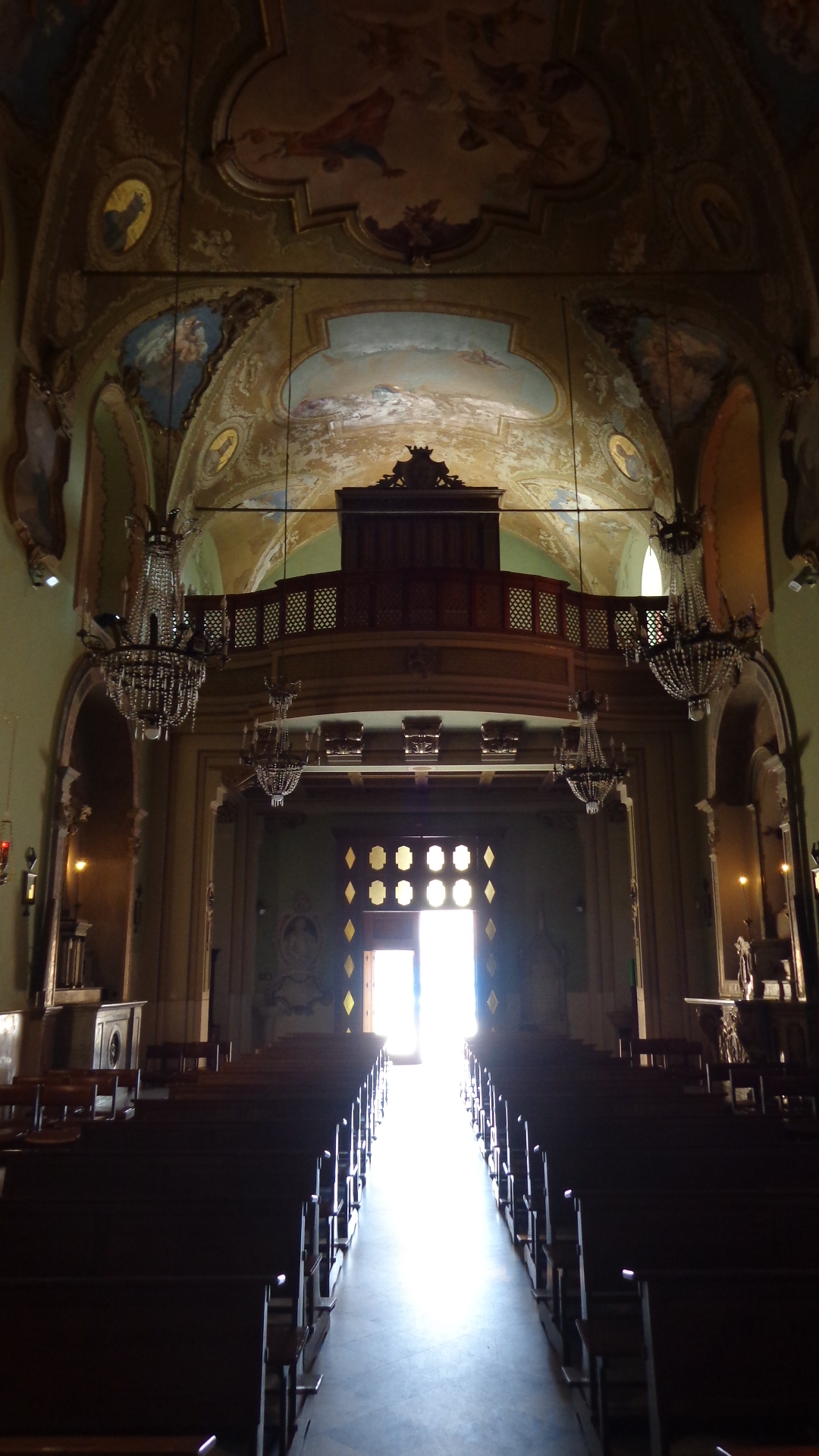 Coro architettura